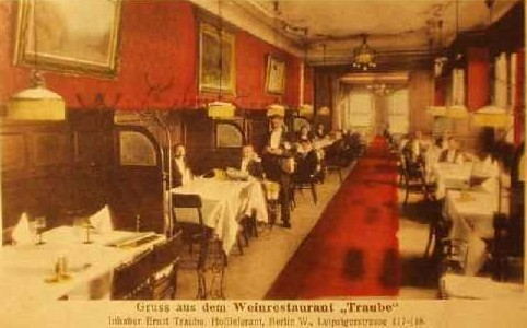 Postkarte mit Innenansicht des Wein-Restaurant „Traube“ in Berlin W, Leipziger Straße 117-118, gelaufen 1908.